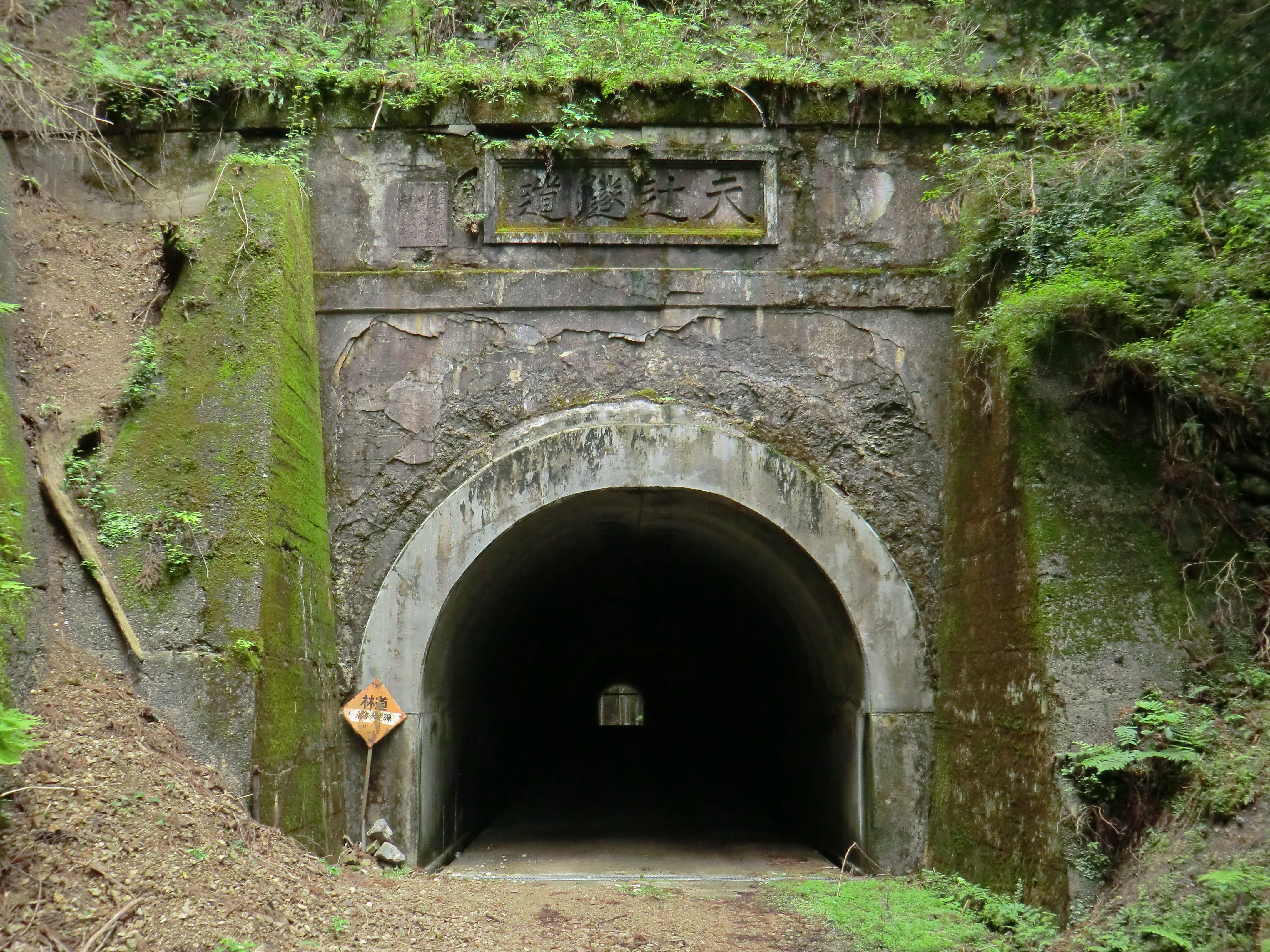 天辻隧道北口